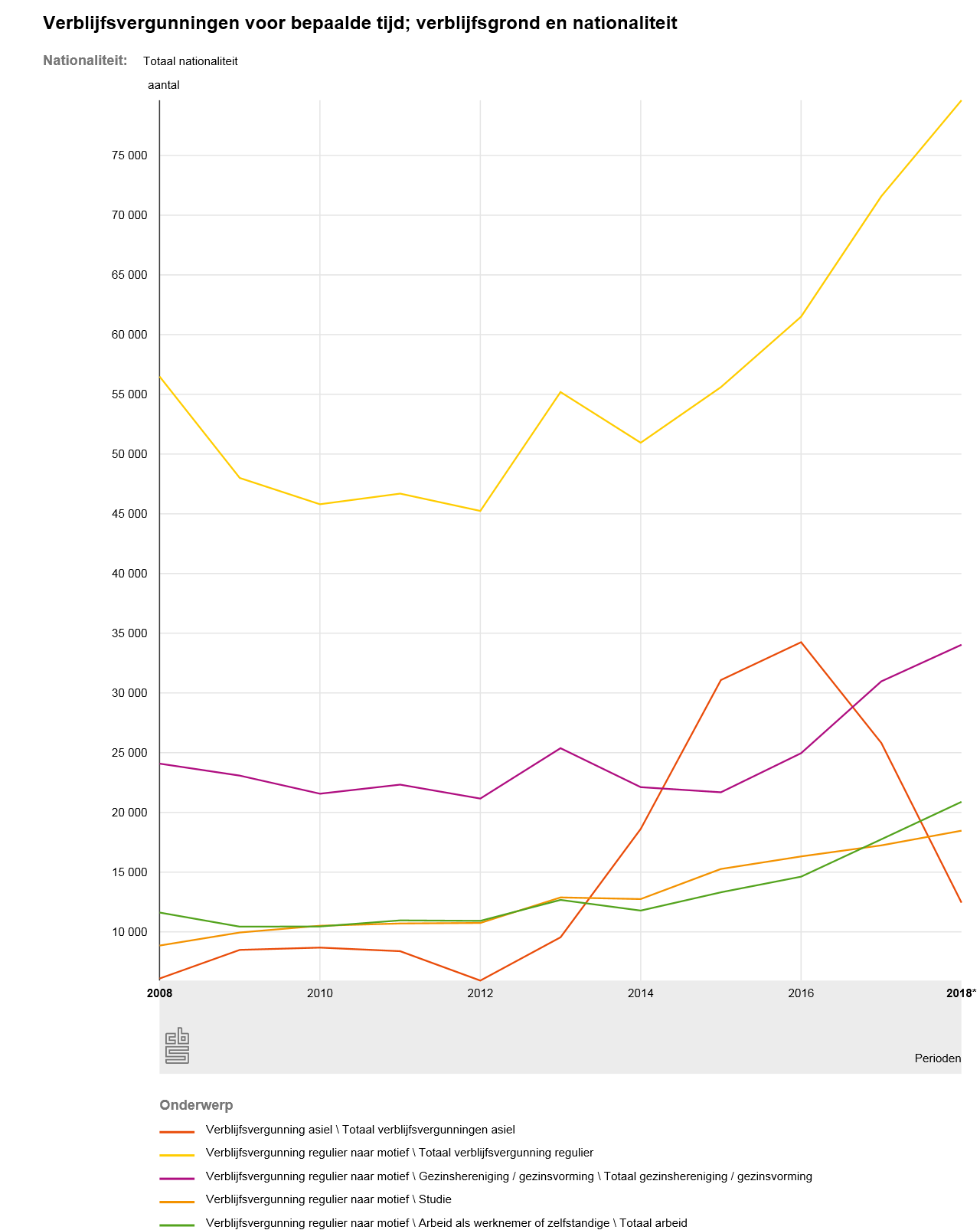 Verblijfsvergunningen naar motief